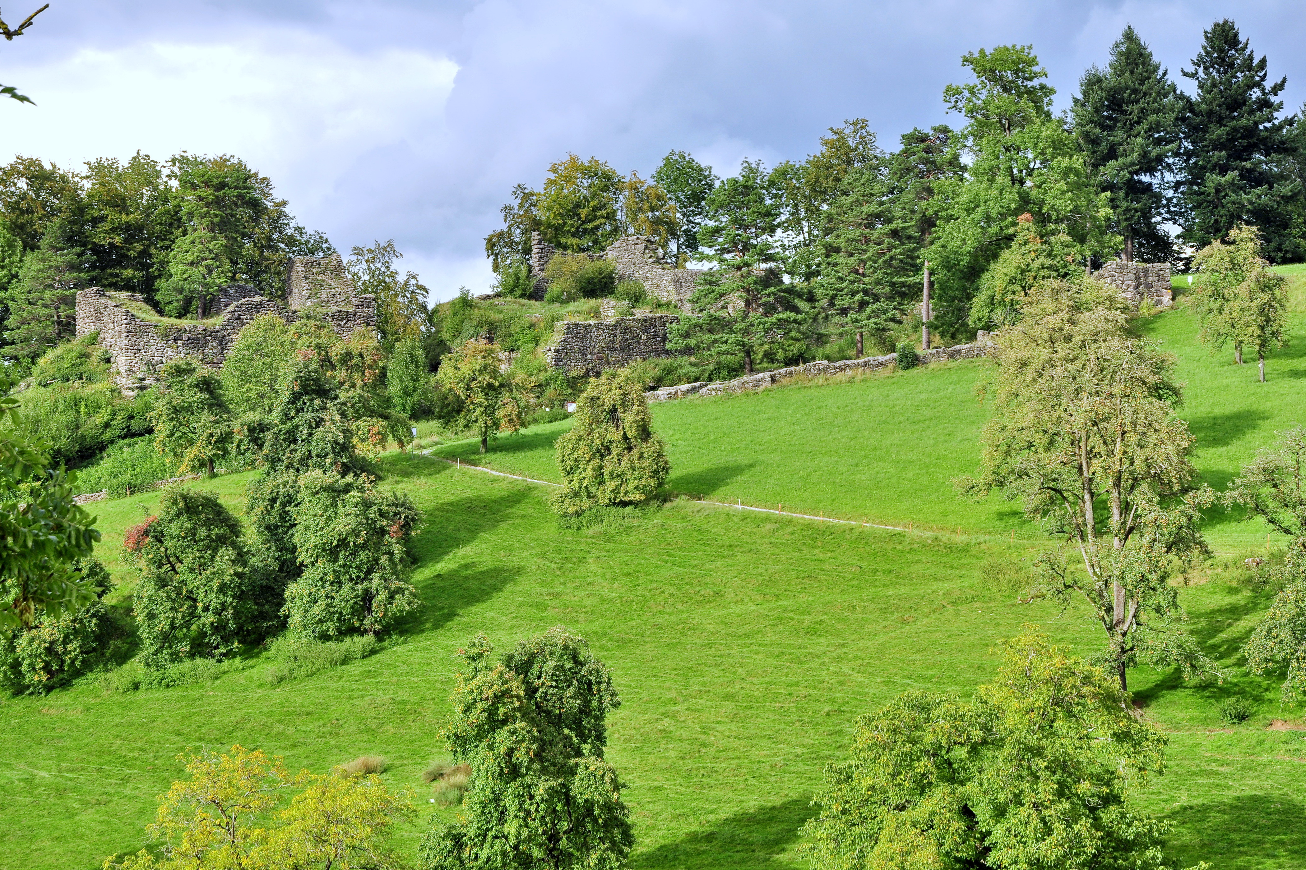 Burgruine Alt Wädenswil in Richterswil (Switzerland)